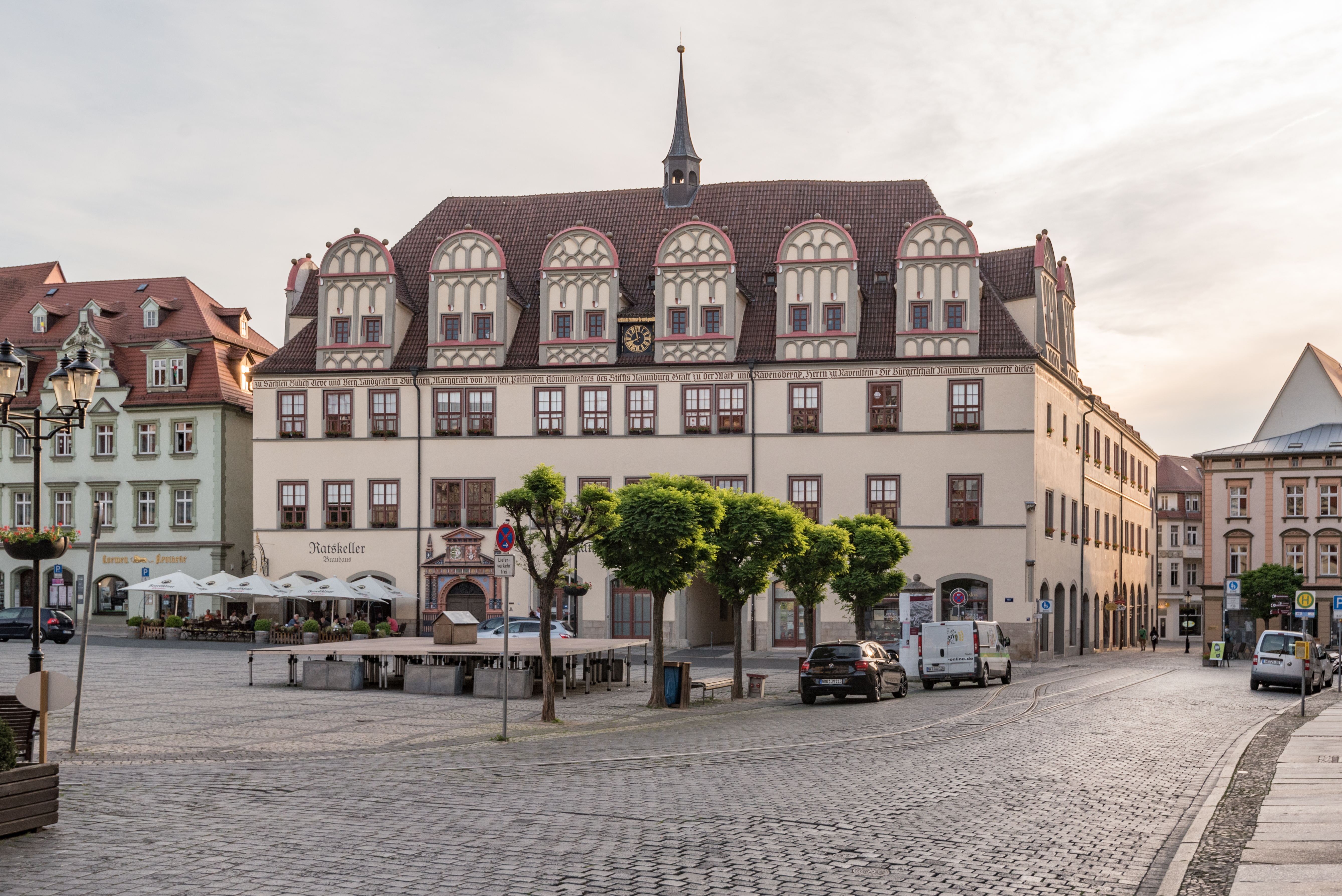 Naumburg (Saale), Markt 1